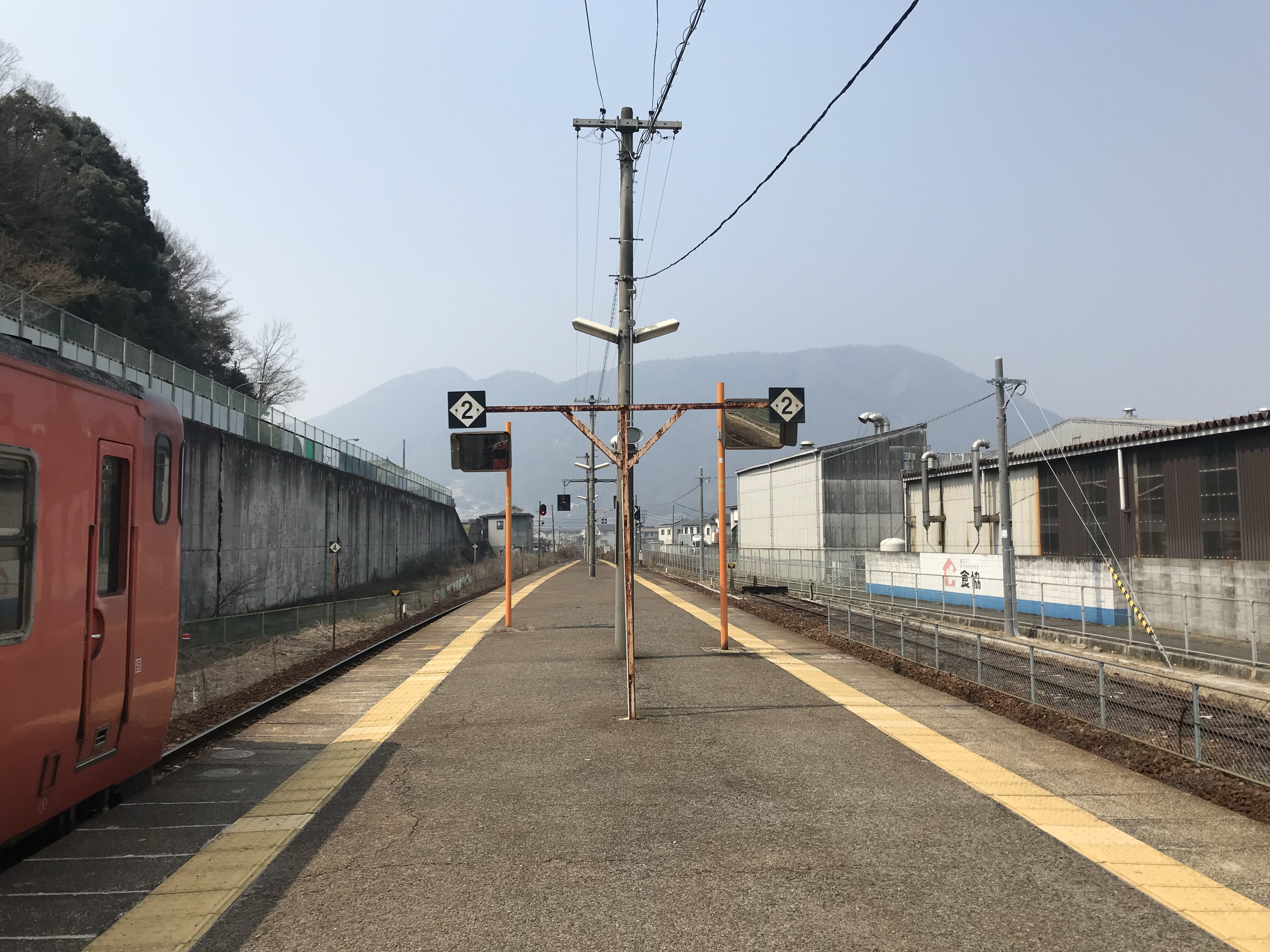 下深川駅のホーム(奥は玖村方面)